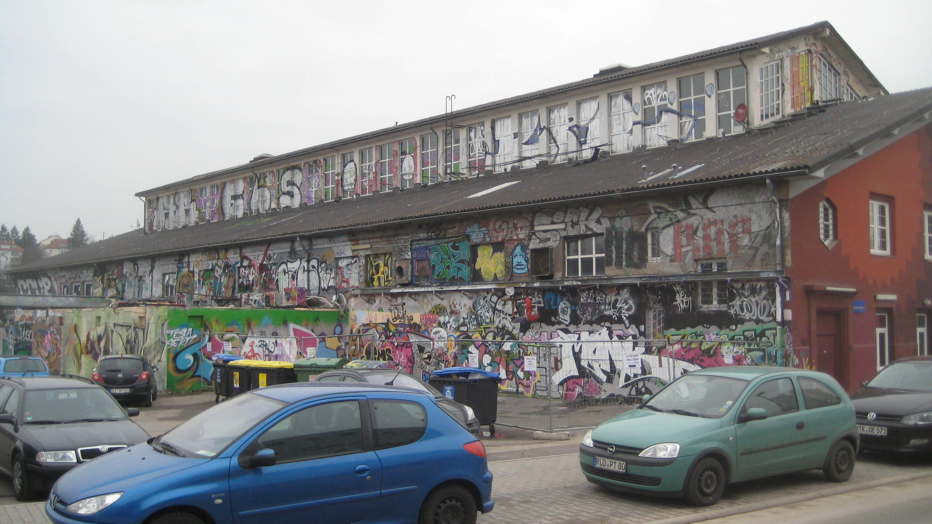 Südseite des Kulturzentrums Schlachthof mit Grafitti 2013